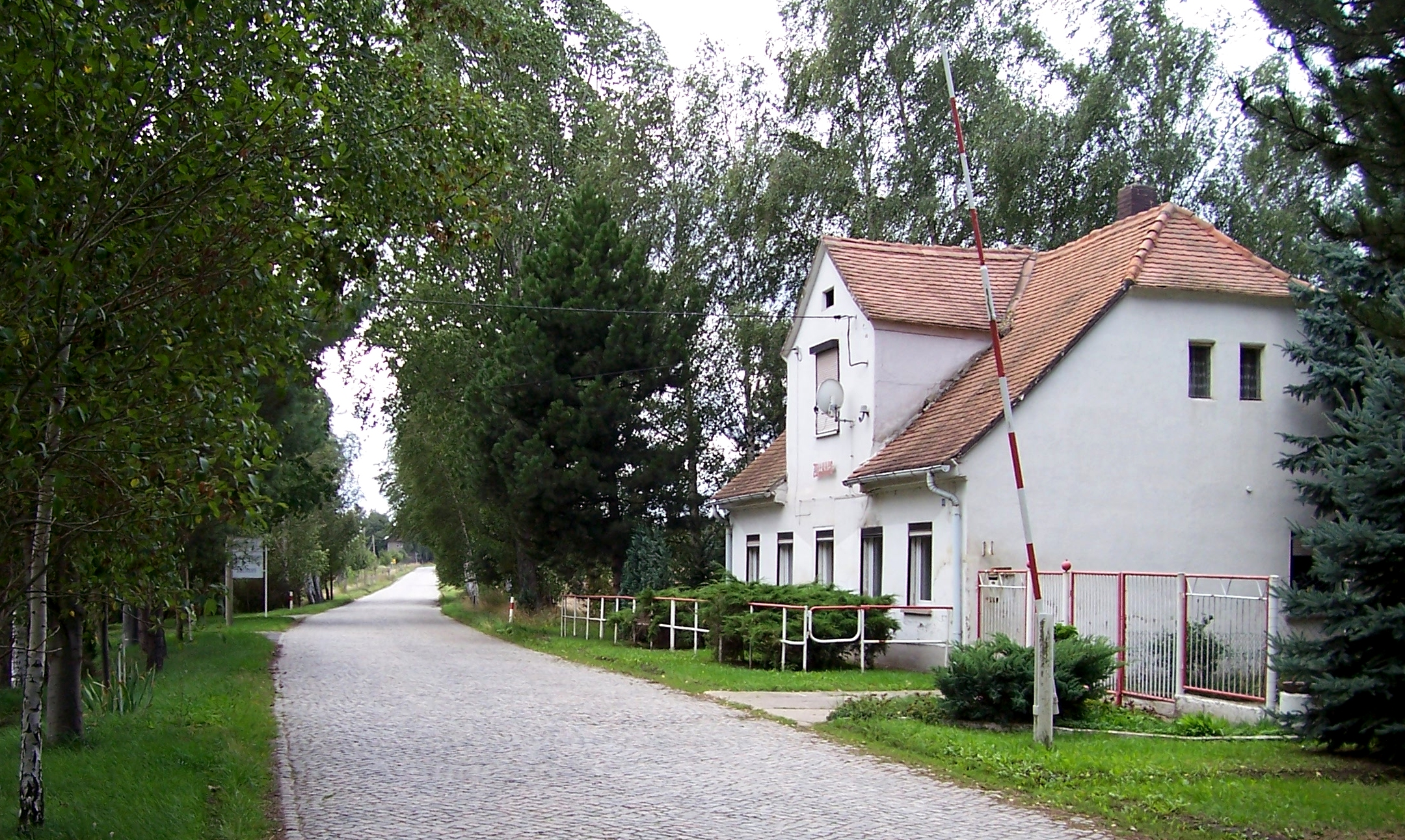 Zollhaus in Elstertrebnitz (Deutschland)